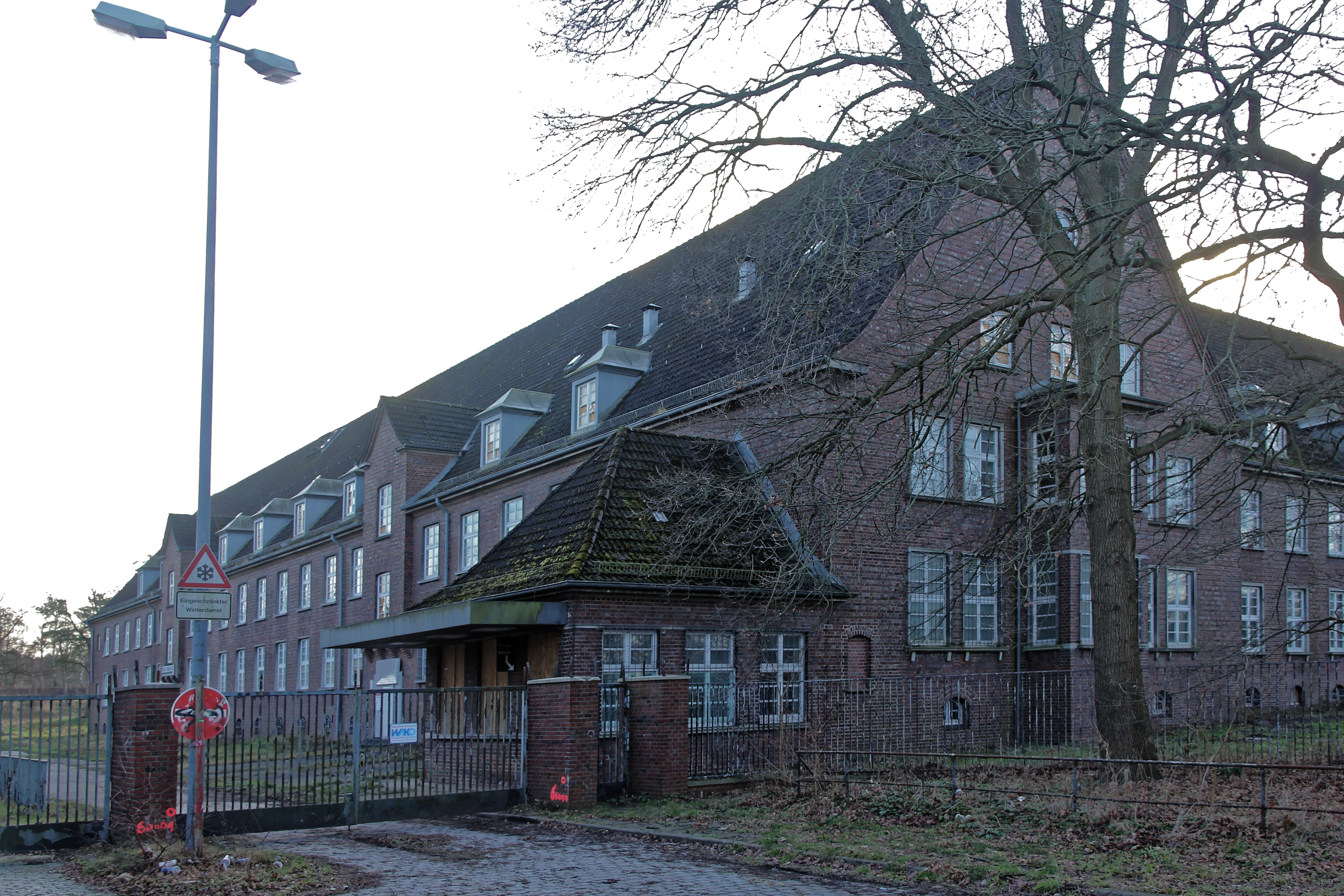 ehemalige Röttger-Kaserne Hamburg-Neugraben-Fischbek, östliches Tor